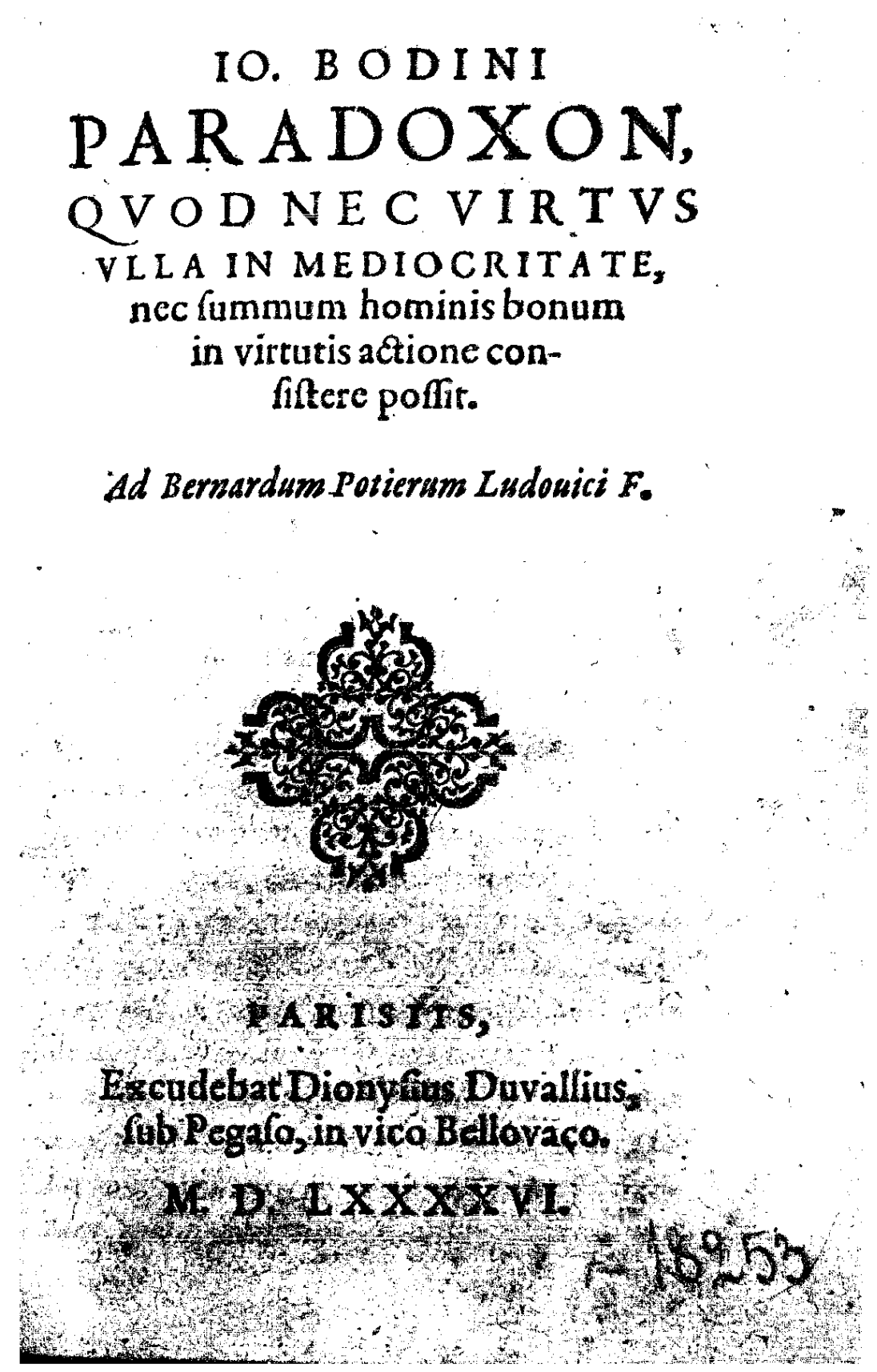 Couverture.